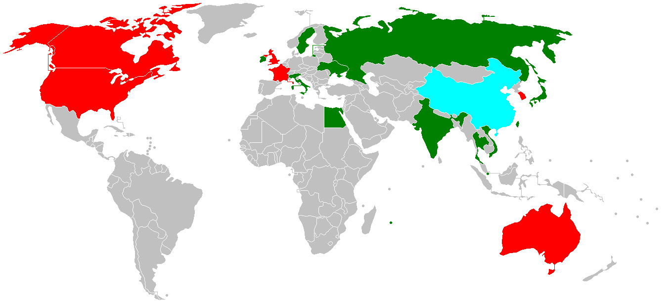 红色表示已经举办专场的国家和地区，绿色表示该国有女嘉宾加入非诚勿扰，天蓝色表示非诚勿扰播出国家。